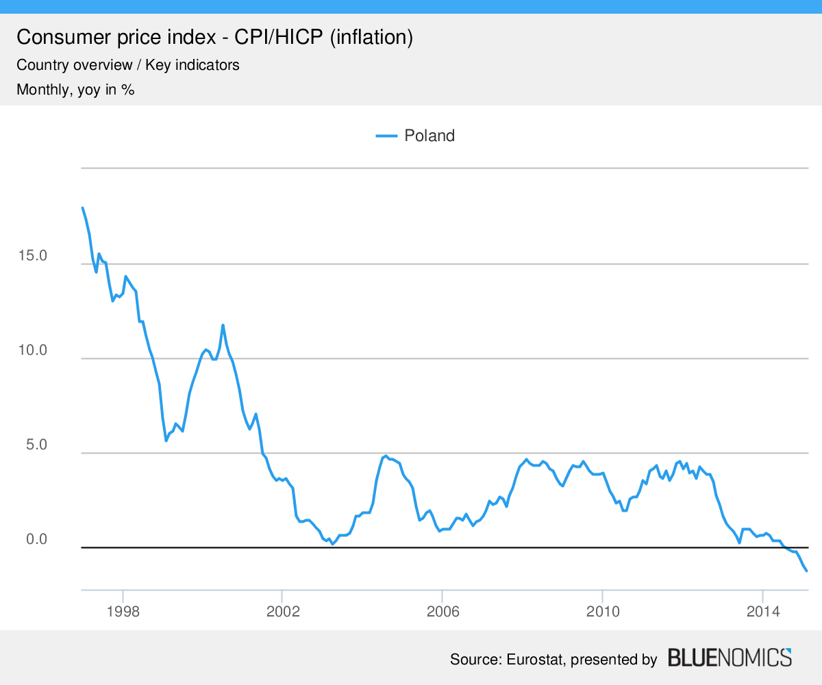 Diese Graphik zeigt die Inflationsentwicklung in Polen